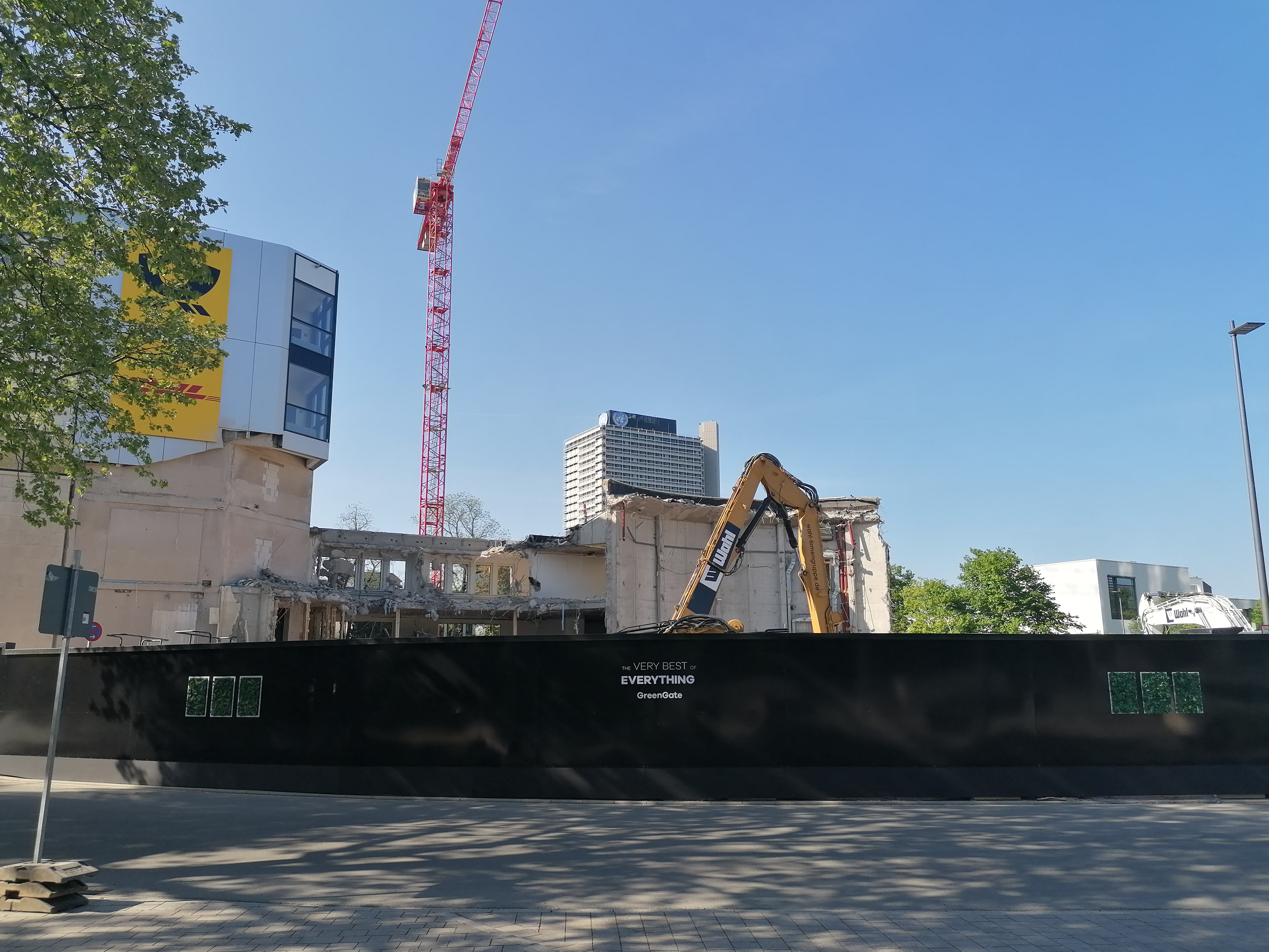 Das Bauprojekt GreenGate der Deutschen Post DHL an der Kurt-Schumacher-Straße 28 (Ecke Fritz-Erler-Straße)